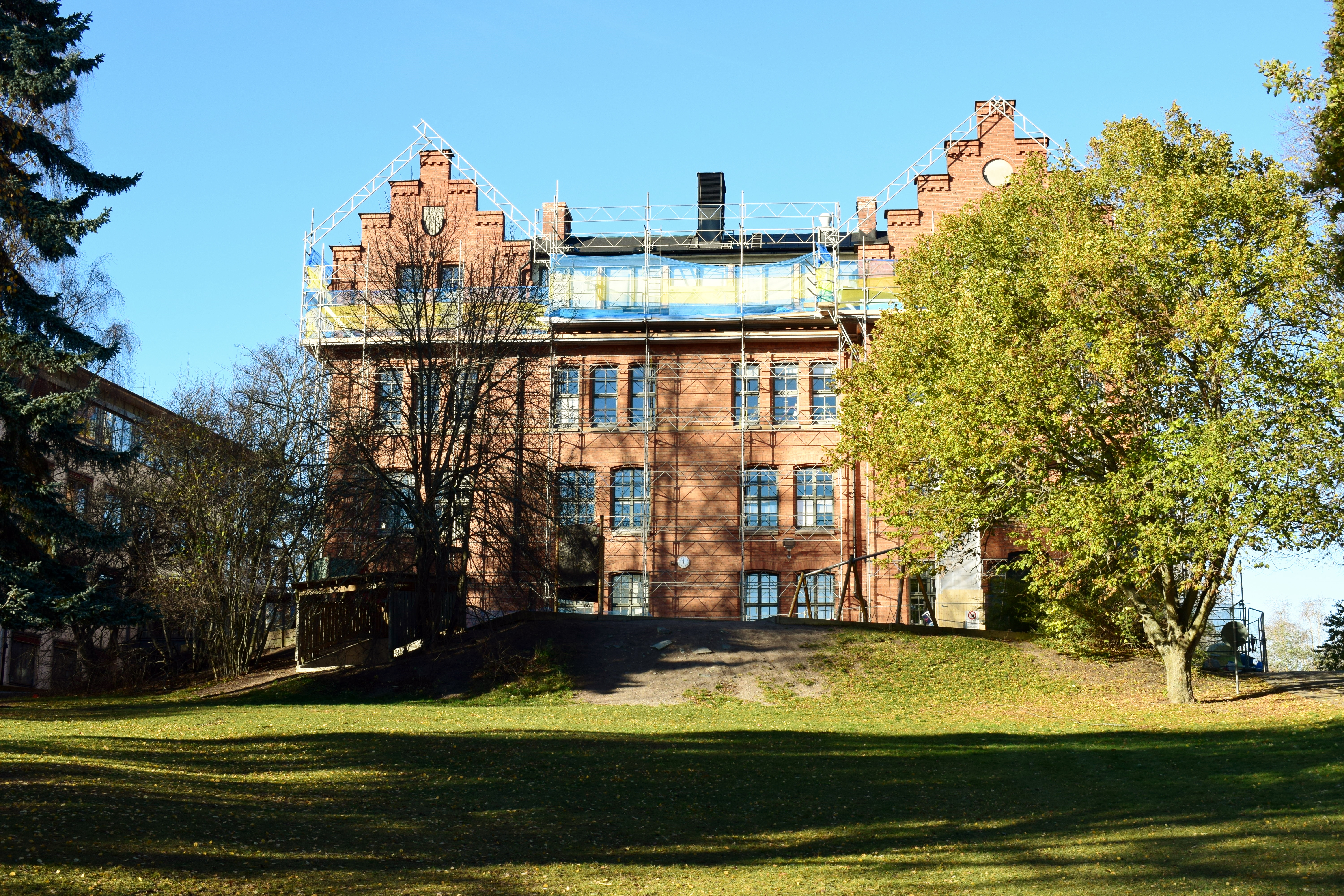 Byggnaden uppfördes 1907 som kasern för 5. kompaniet ur Svea ingenjörkår (Ing 1) som fanns i Vaxholm åren 1908–1937. Under perioden september 1939–april 1940 användes fastigheten som interneringsläger för tre polska ubåtsbesättningar. Från den 4 december 1944 till den 30 juni 1994 användes fastigheten av staben för Vaxholms försvarsområde/Stockholms kustartilleriförsvar. År 1994 övertogs fastigheten av försäkringsbolaget DIAL. År 2004 lämnades fastigheten och blev senare känd genom den så kallade den så kallade Vaxholmskonflikten åren 2004–2005. Fastigheten har sedan dess omvandlats till Söderfjärdsskolan.